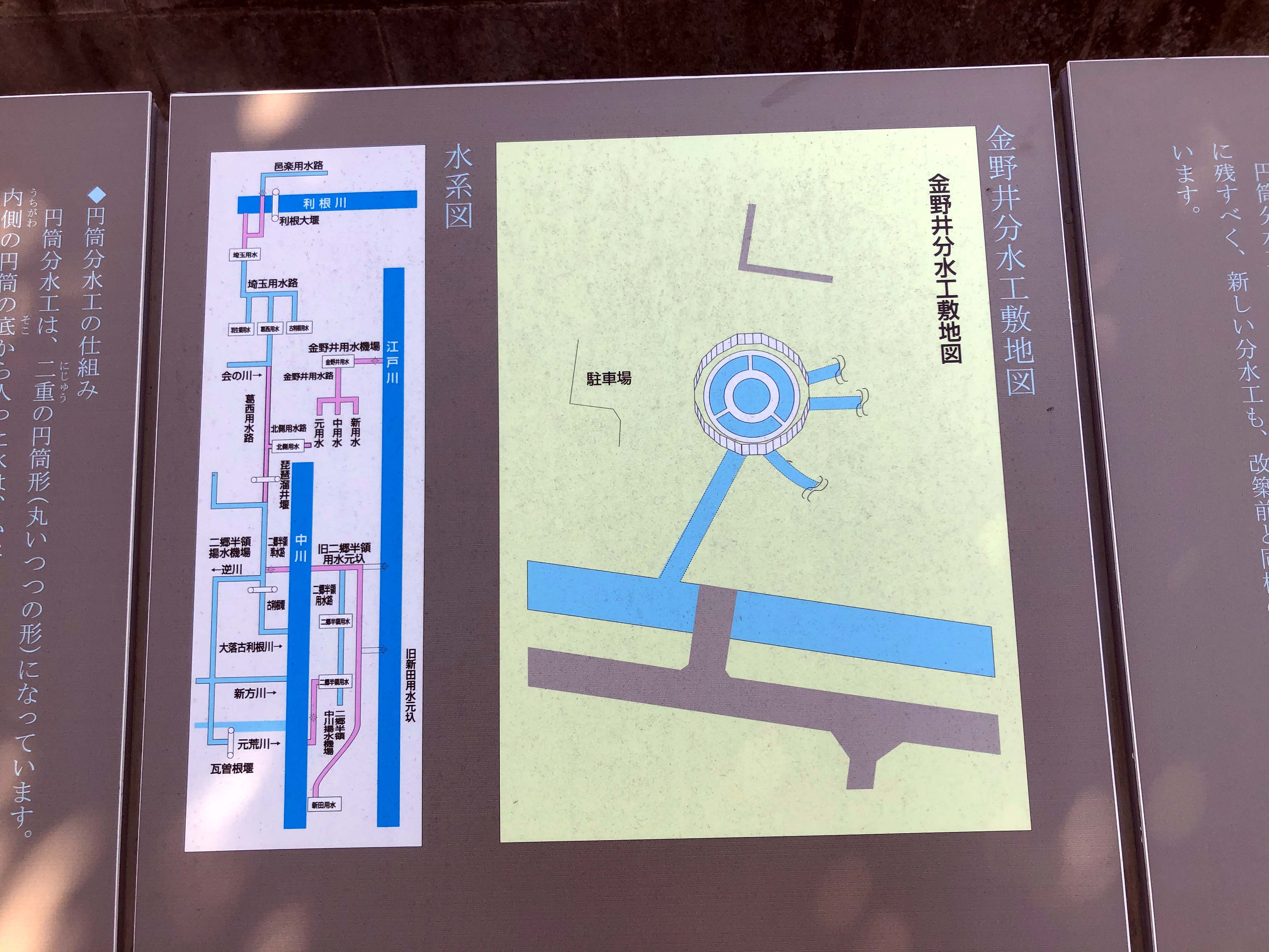 二郷半領分水工横に設置されている金野井分水工(吉川市上内川)の説明文の一部